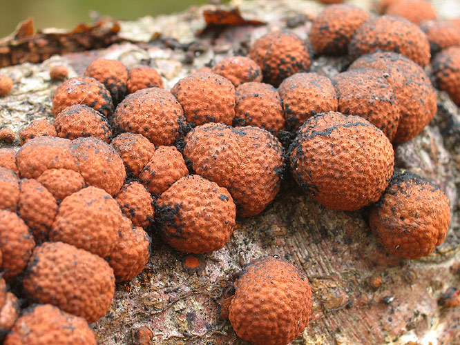 Rötliche Kohlenbeere (Hypoxylon fragiforme) auf einem abgestorbenen Buchenast